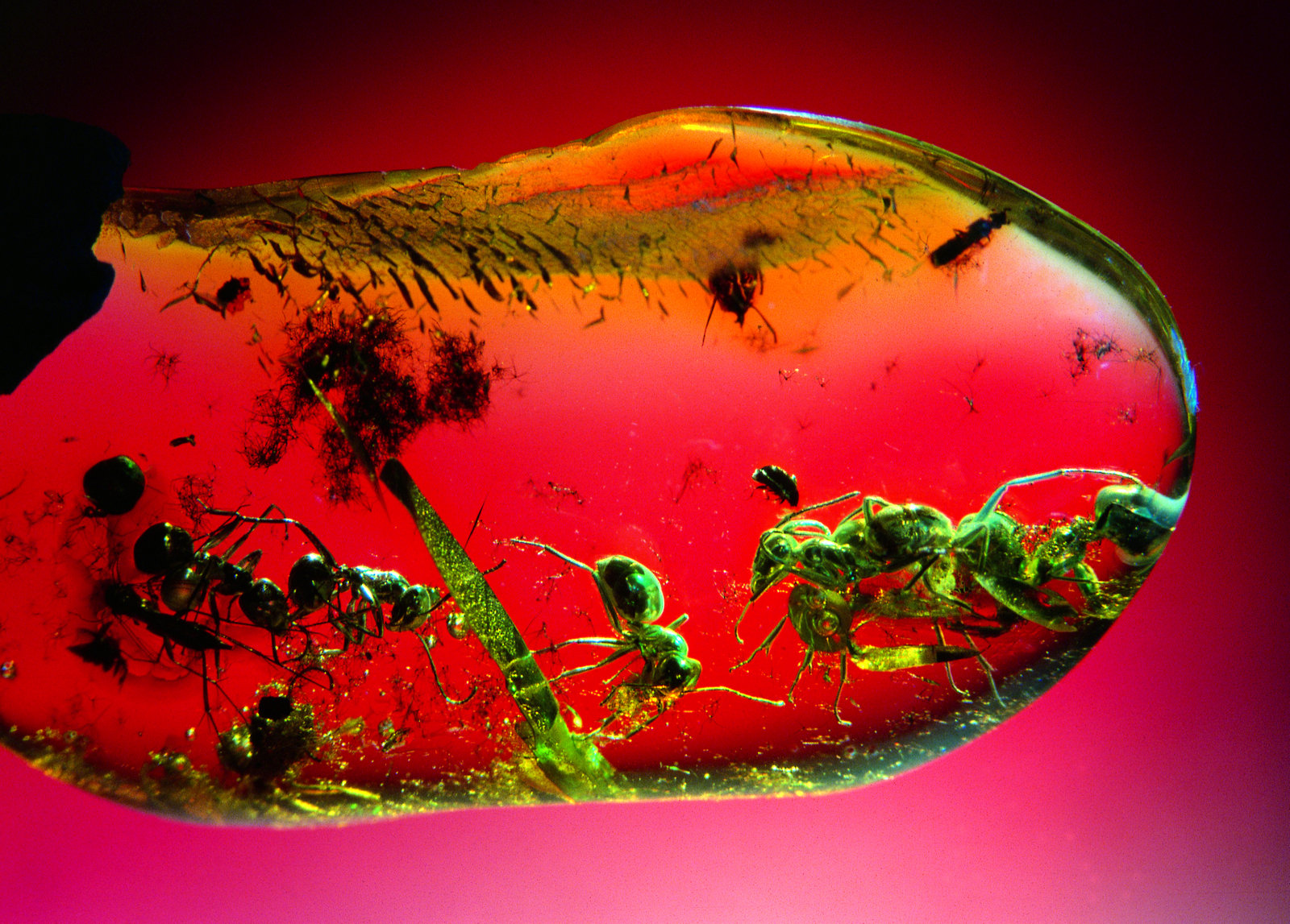 Fotografie von Otto Potsch welches Inklusen im Baltischen Bernstein zeigt.